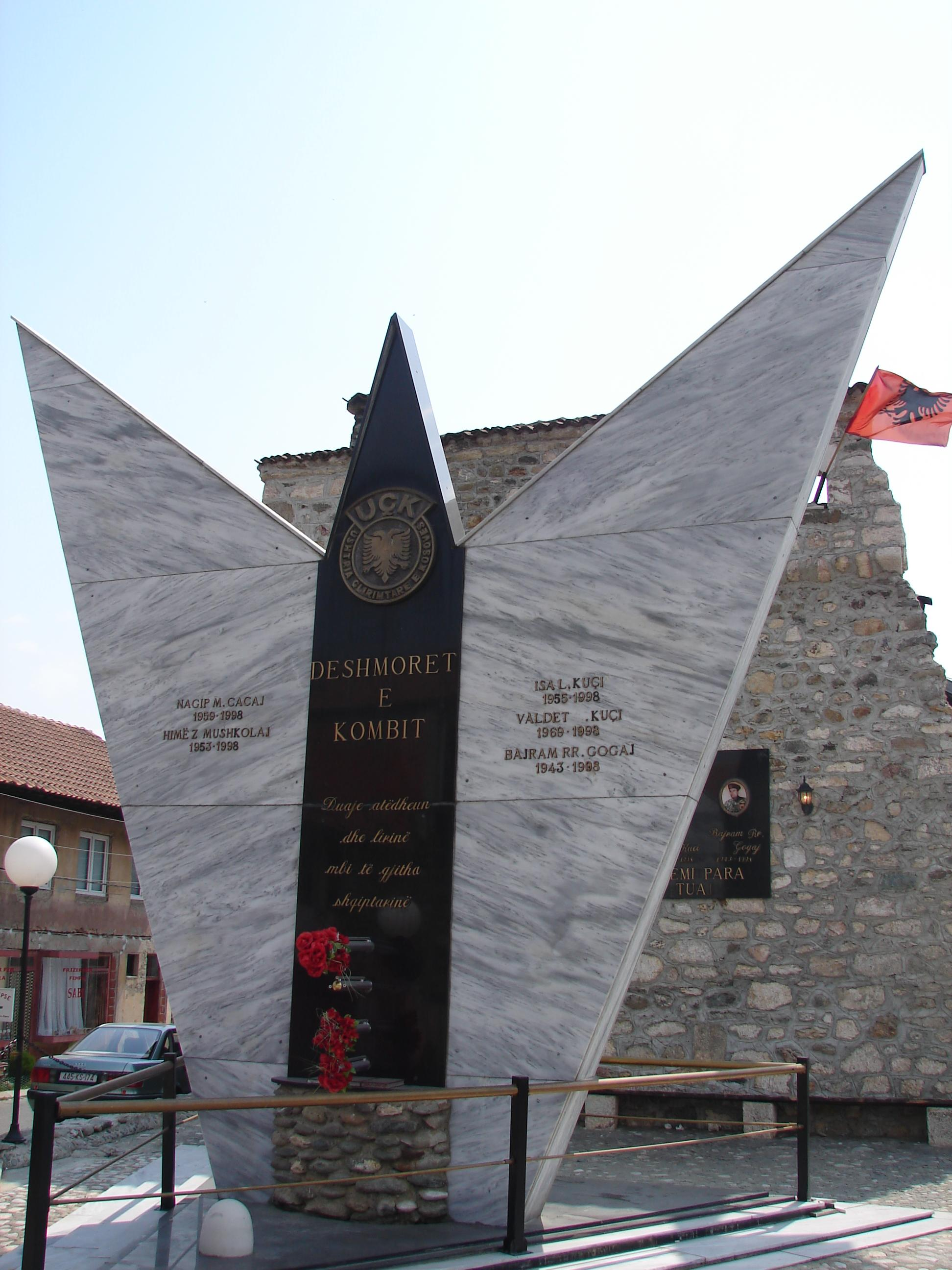 UÇK monument in Deçan, Kosova